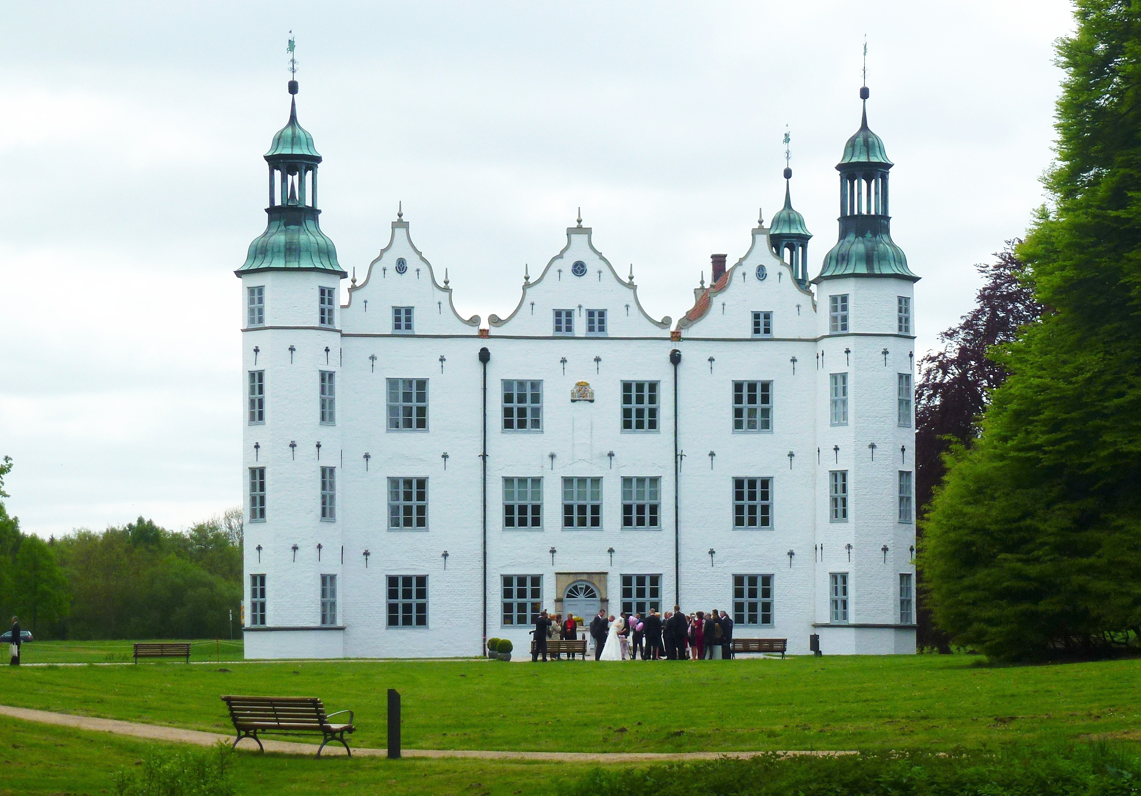 Schloss Ahrensburg, Nordfassade